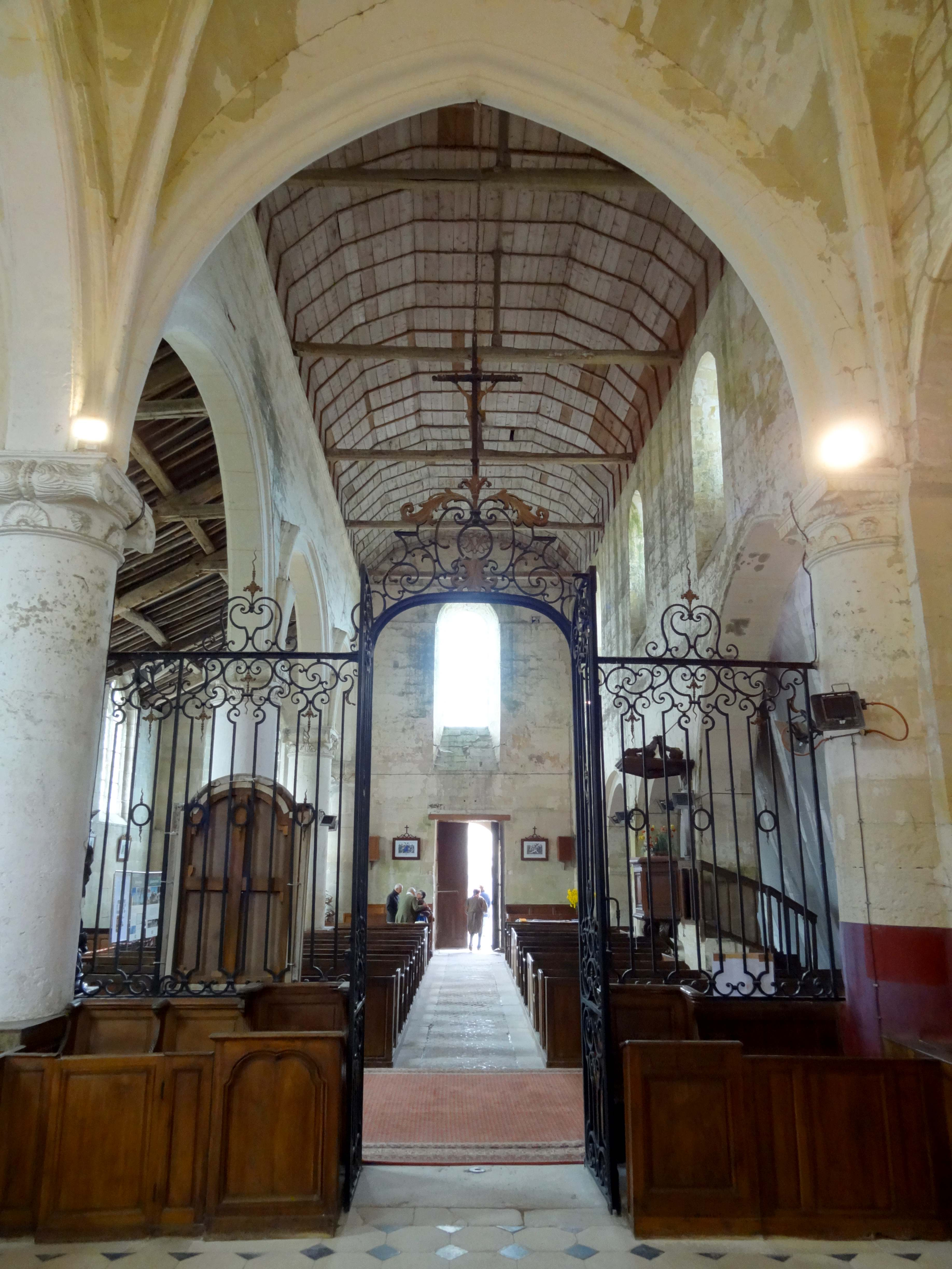 Intérieur de l'église - voir titre.